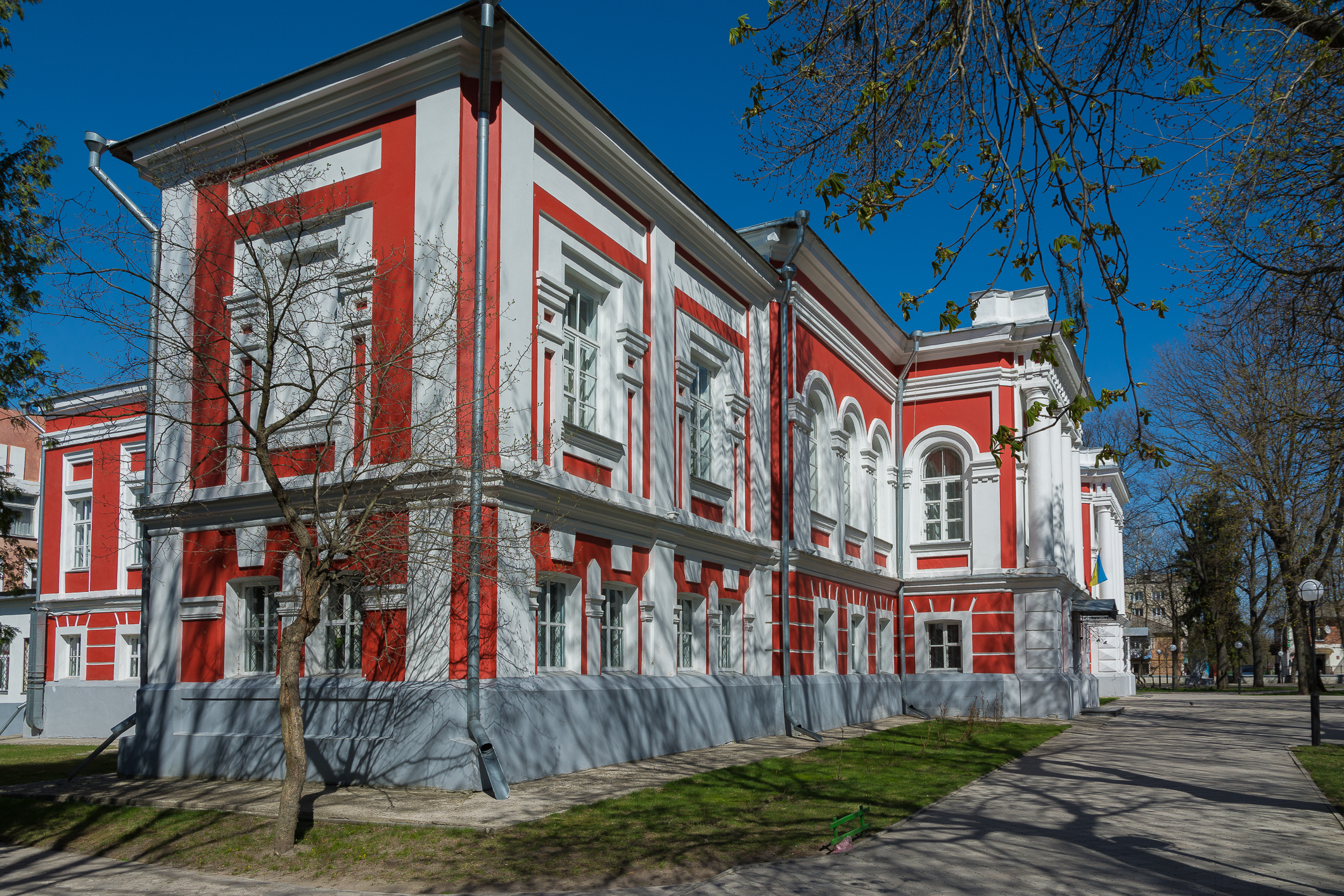 Глухівська чоловіча гімназія, Глухів, вул. Києво-Московська, 24